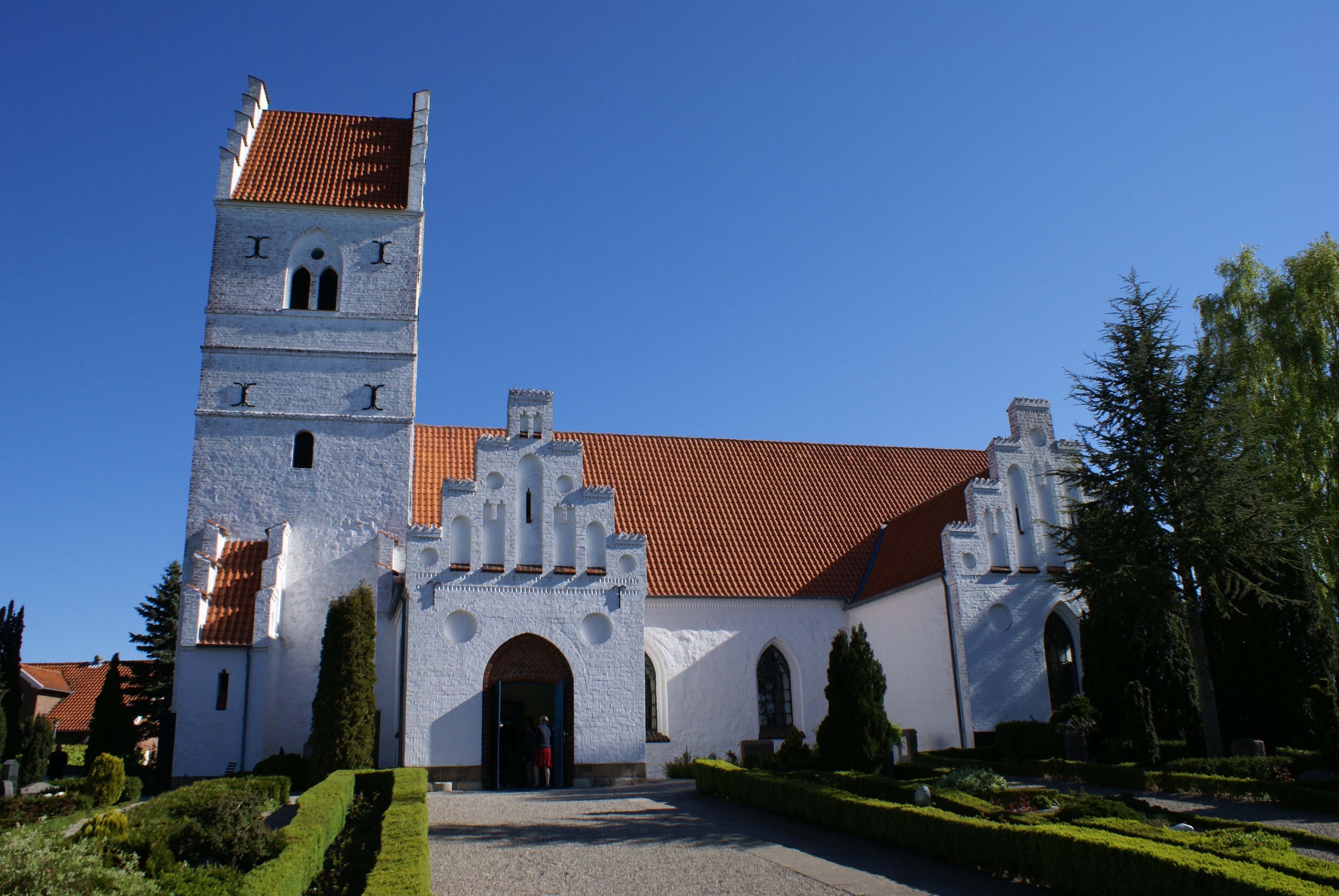 Herlufmagle Kirke (mellem Ringsted og Næstved)